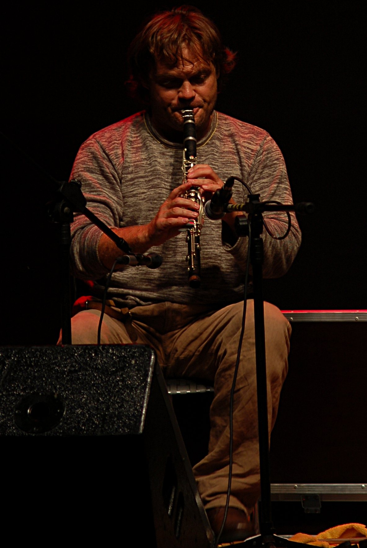 Nikola Parow (Никола Паров) in Warsaw (Lapidarium concert)